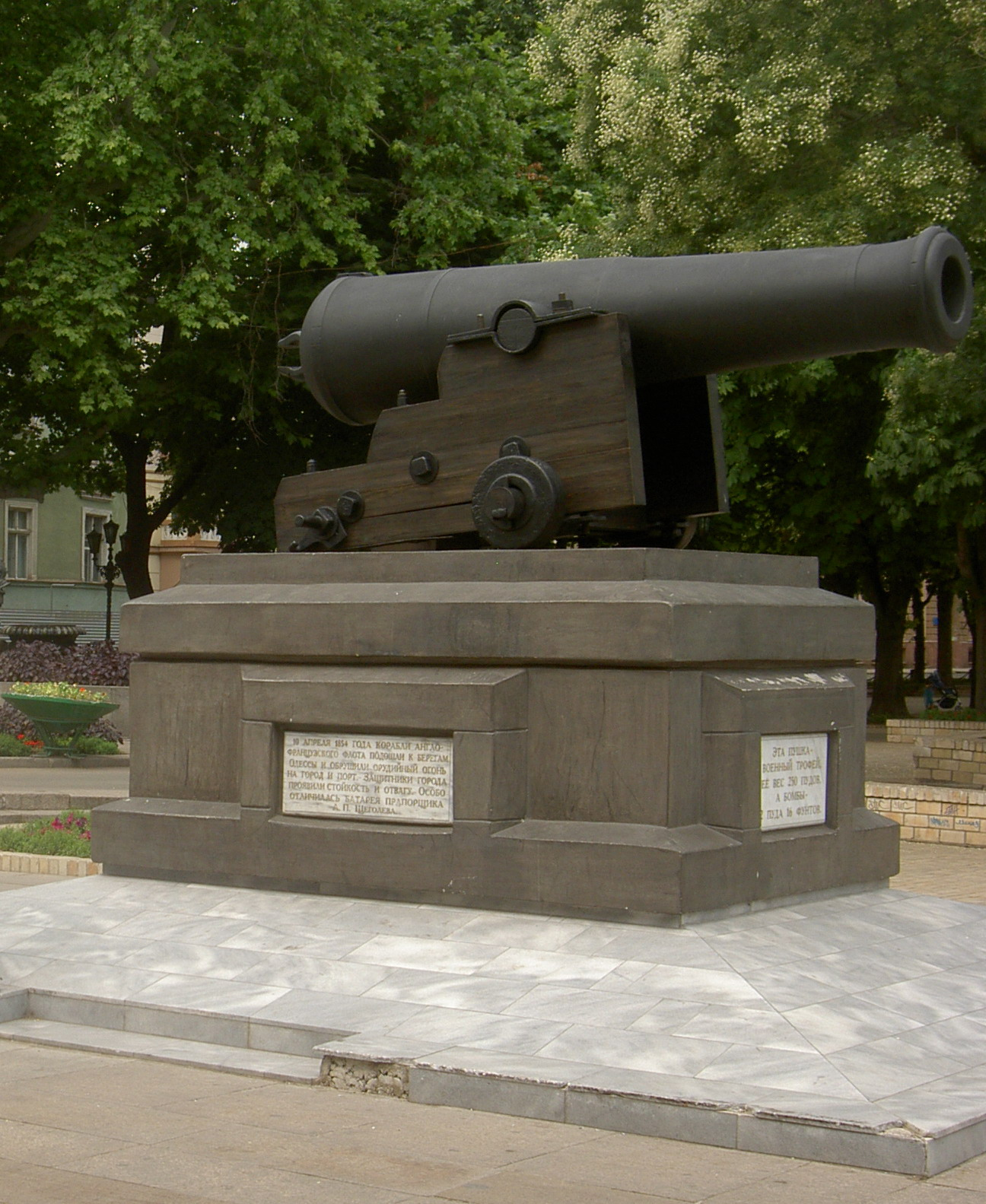 Dělo v Oděse